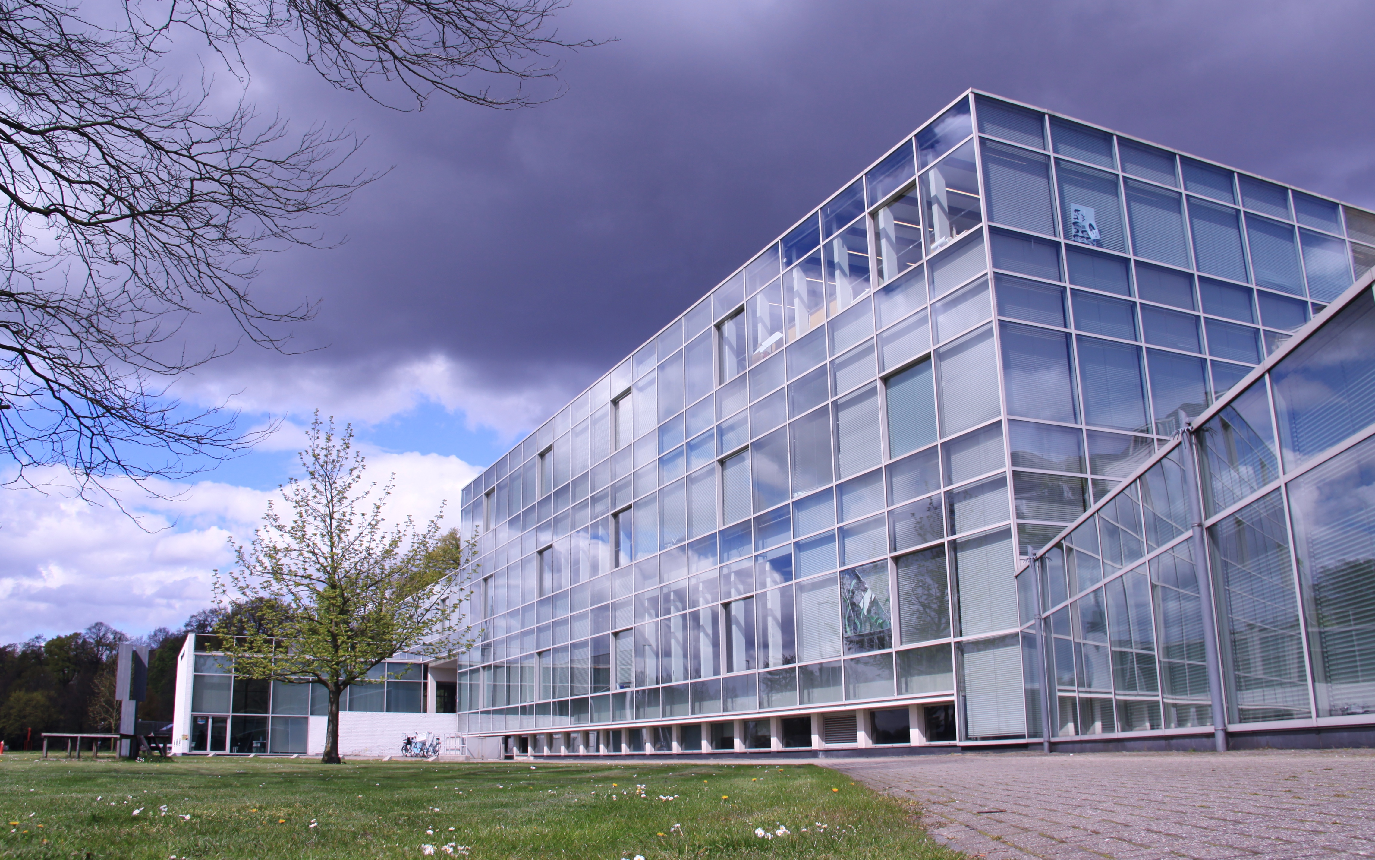 Academie voor Beeldende Kunsten in Arnhem (architect Gerrit Rietveld